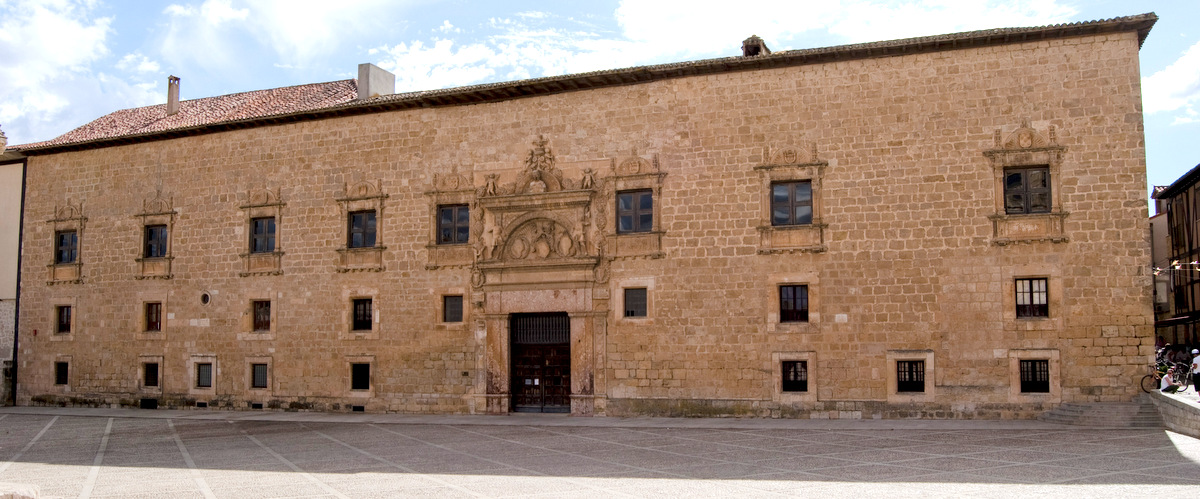 Palacio de los Condes de Miranda o Palacio de Avellaneda. Peñaranda de Duero. España.